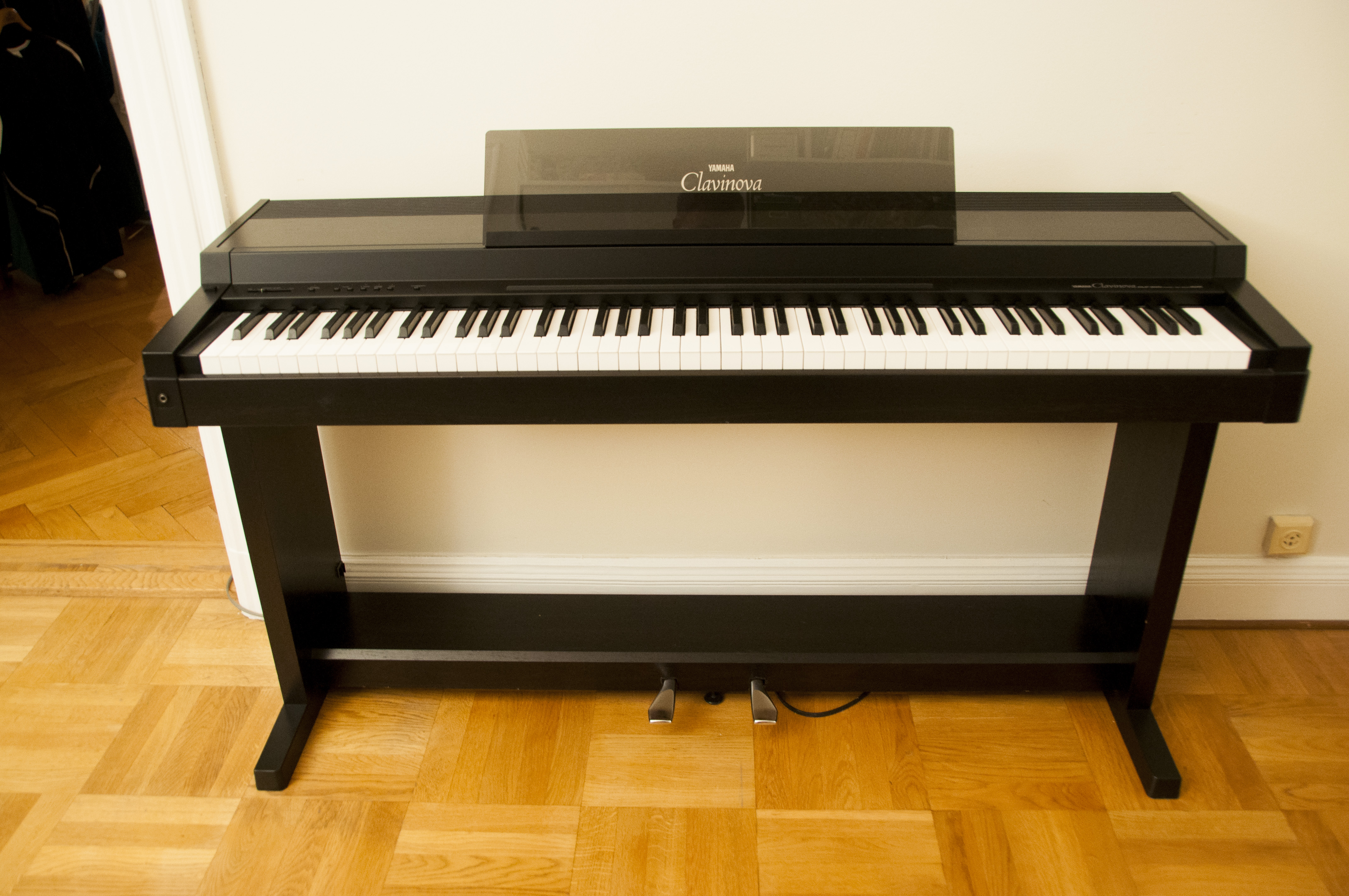 Yamaha Clavinova CLP-300